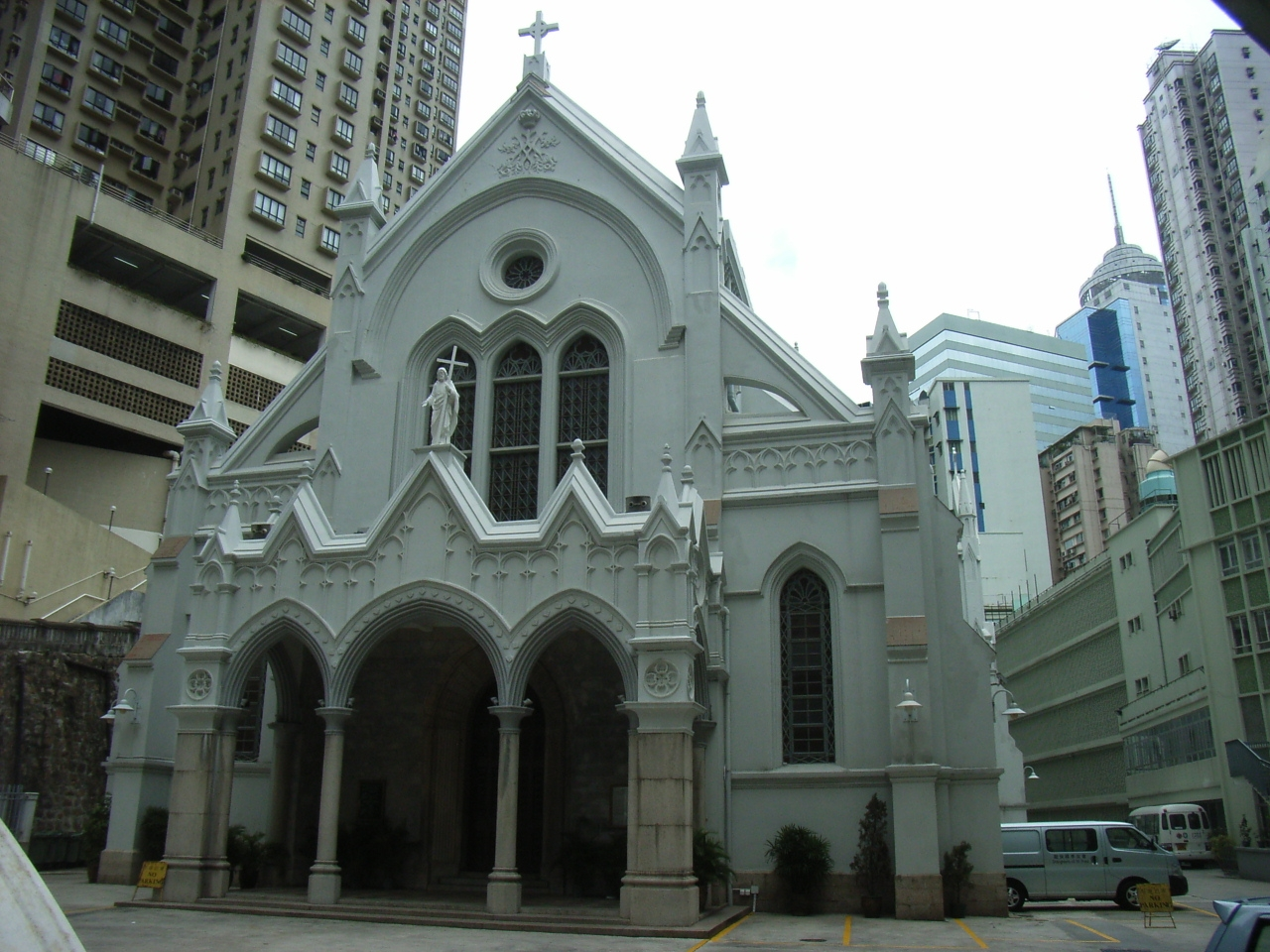 聖母無原罪主教座堂是天主教香港教區的主教座堂，位於香港中環堅道，於1888年落成。